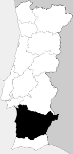 Antigua provincia del Baixo Alentejo Former province of Baixo Alentejo, Portugal Created by User:Brian Boru in September 2005, based on a map created by Jorge Candeias.